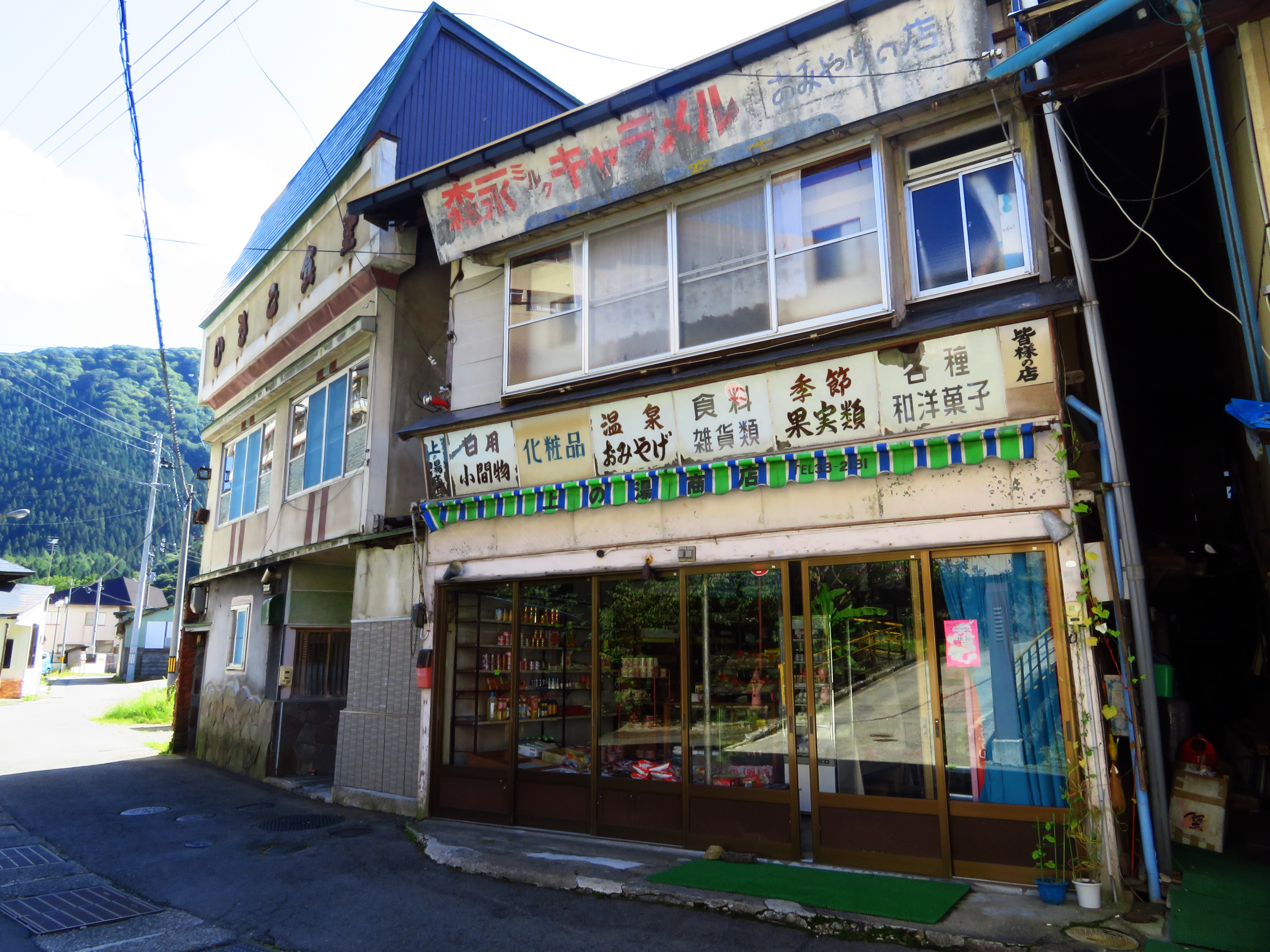 湯瀬温泉街：秋田県鹿角市 Canon PowerShot SX720 HS